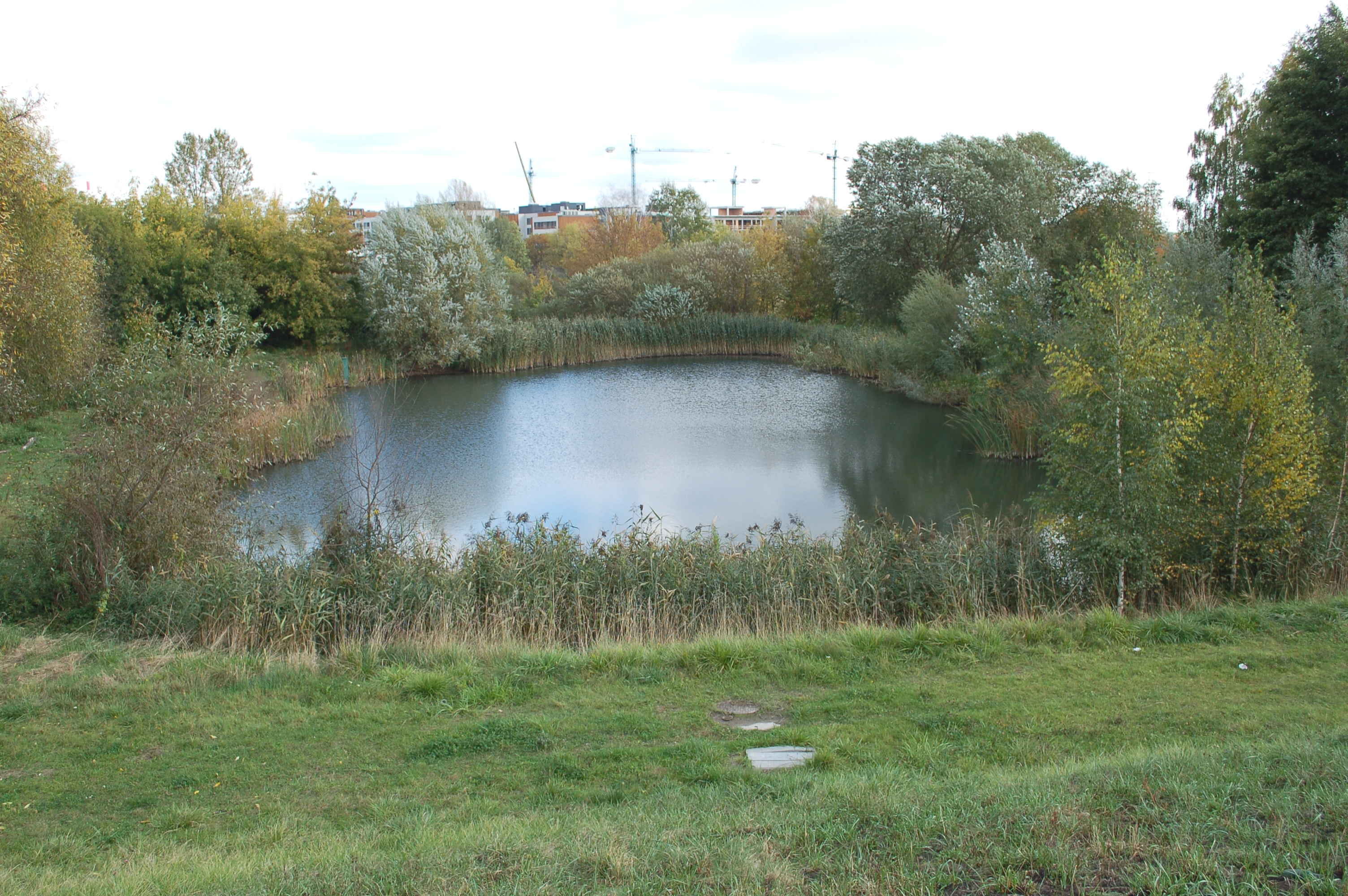 Gucin Gaj